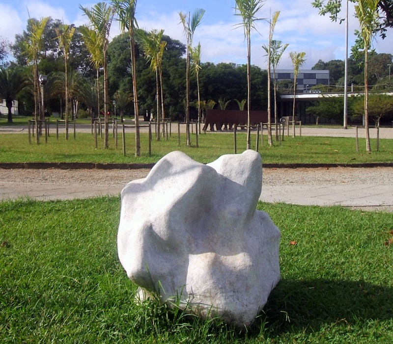 Felícia Leirner - 1070, 1973. Escultura, argamassa cimentícia pintada, 95 x 101 x 101 cm. Jardim de Esculturas, Museu de Arte Moderna de São Paulo, Brasil.